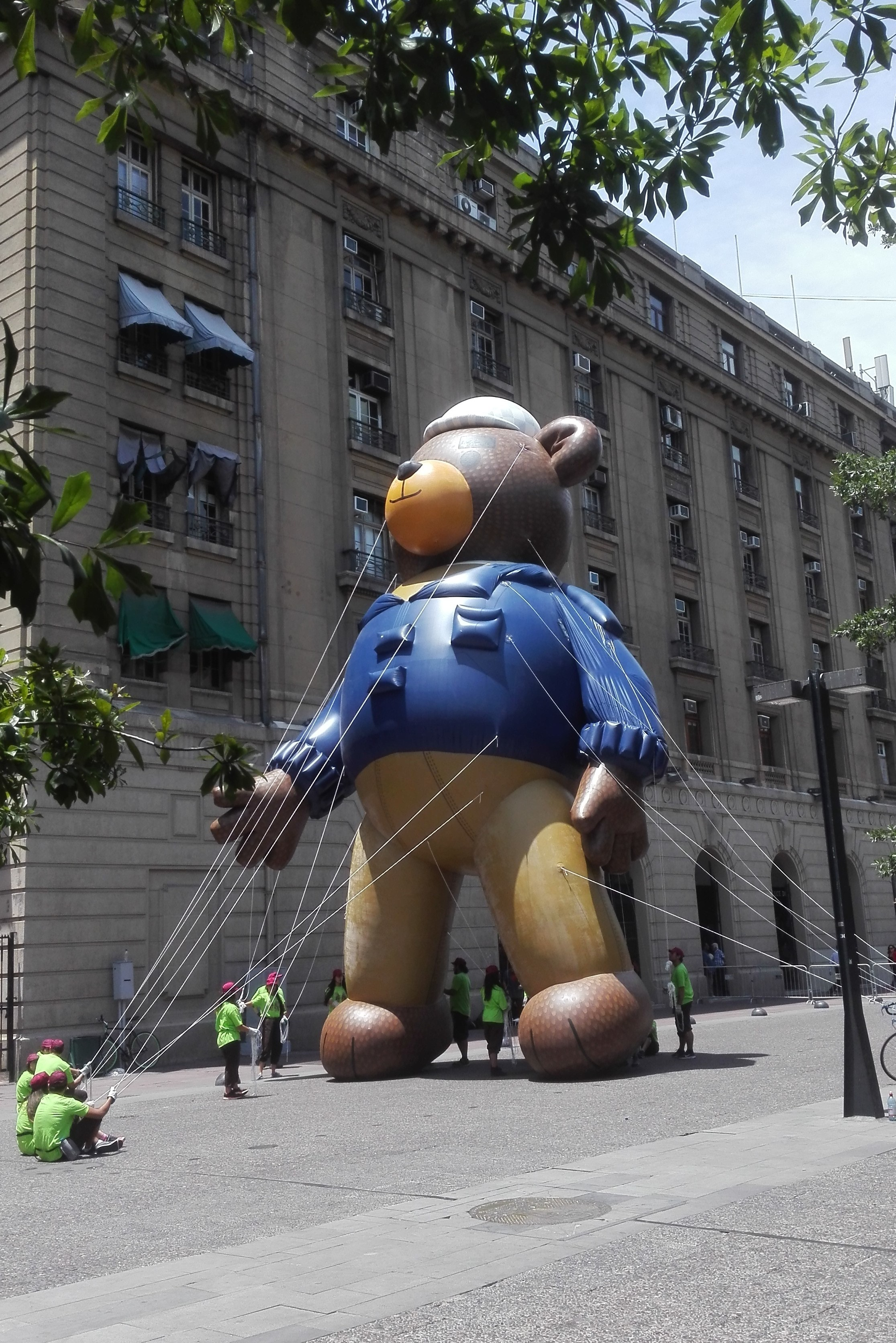 Globo con la figura del personaje Papá oso de Historia de un oso, en el ensayo del Paris Parade, Santiago de Chile.